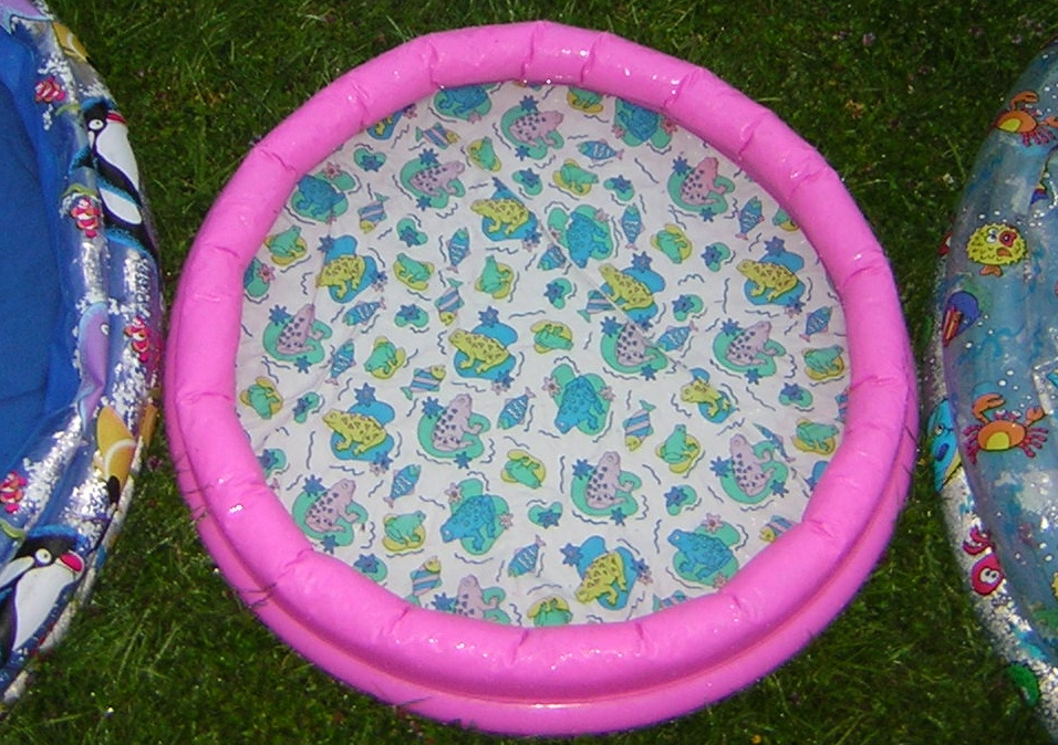 Beschreibung: Schwimmbecken Fotograf: Trexer, User:Trexer Aufgenommen: 2005 mit Nikon Coolpix 2200